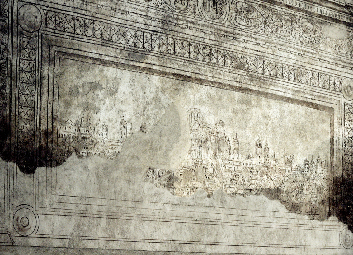 Milano cinquecentesca, Abbazia di Chiaravalle, Milano, Italy